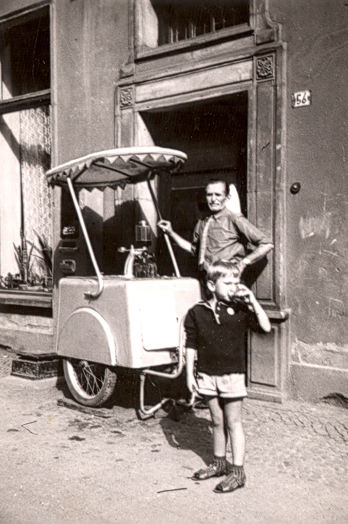 Saturator przy ul. Długiej w Gdańsku